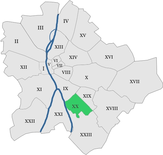 map hungary budapest district 20